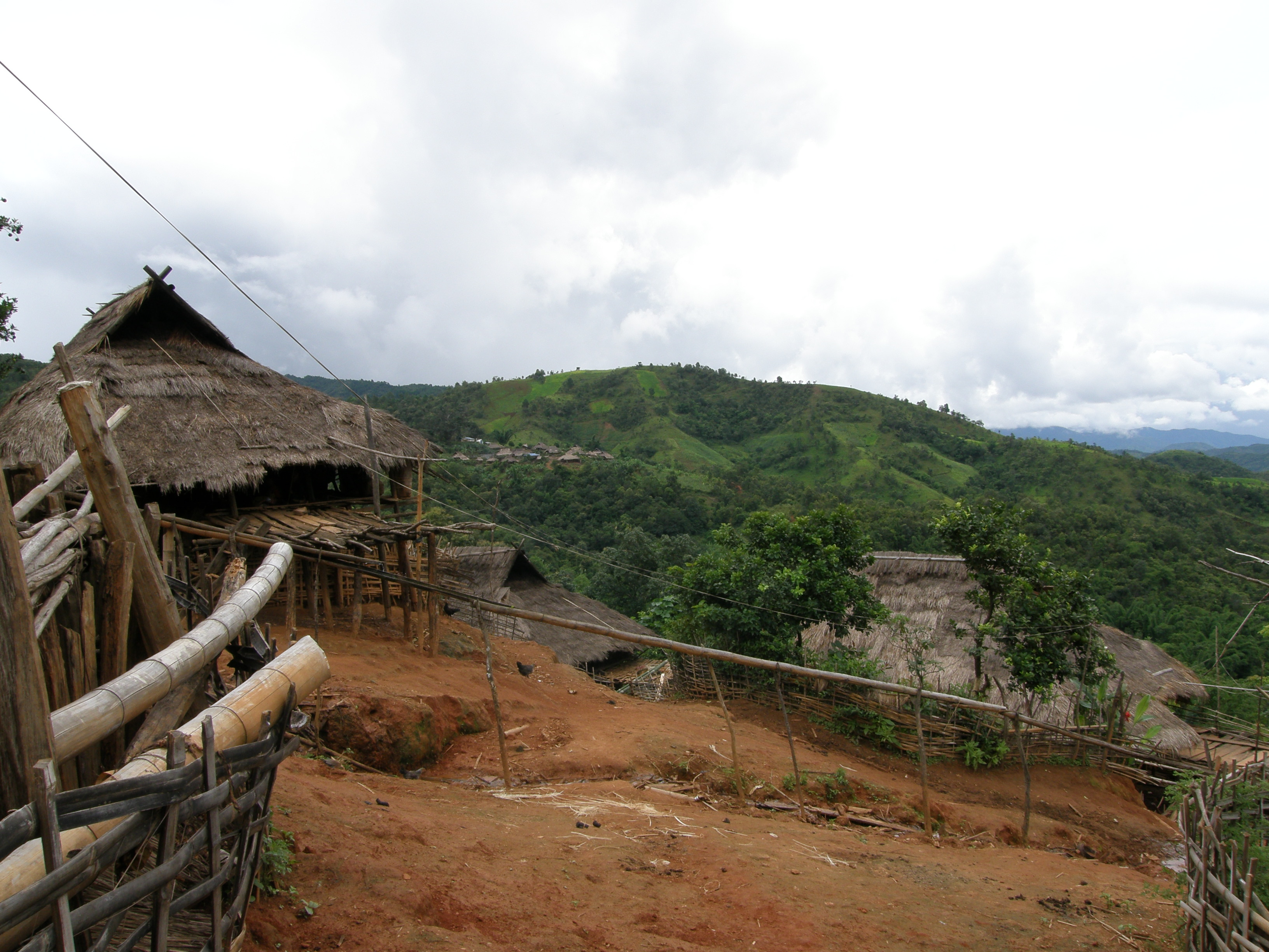 Tribal village near Kengtung